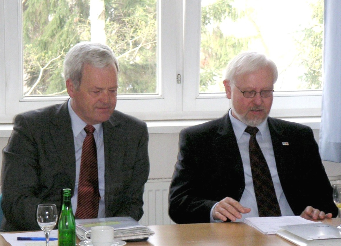 Johannes K. Rücker als Bundesvorsitzender der KBE im Gespräch mit Staatssekretär Dr. Hermann Kues (CDU) in der Katholischen Akademie Berlin (Mai 2005)